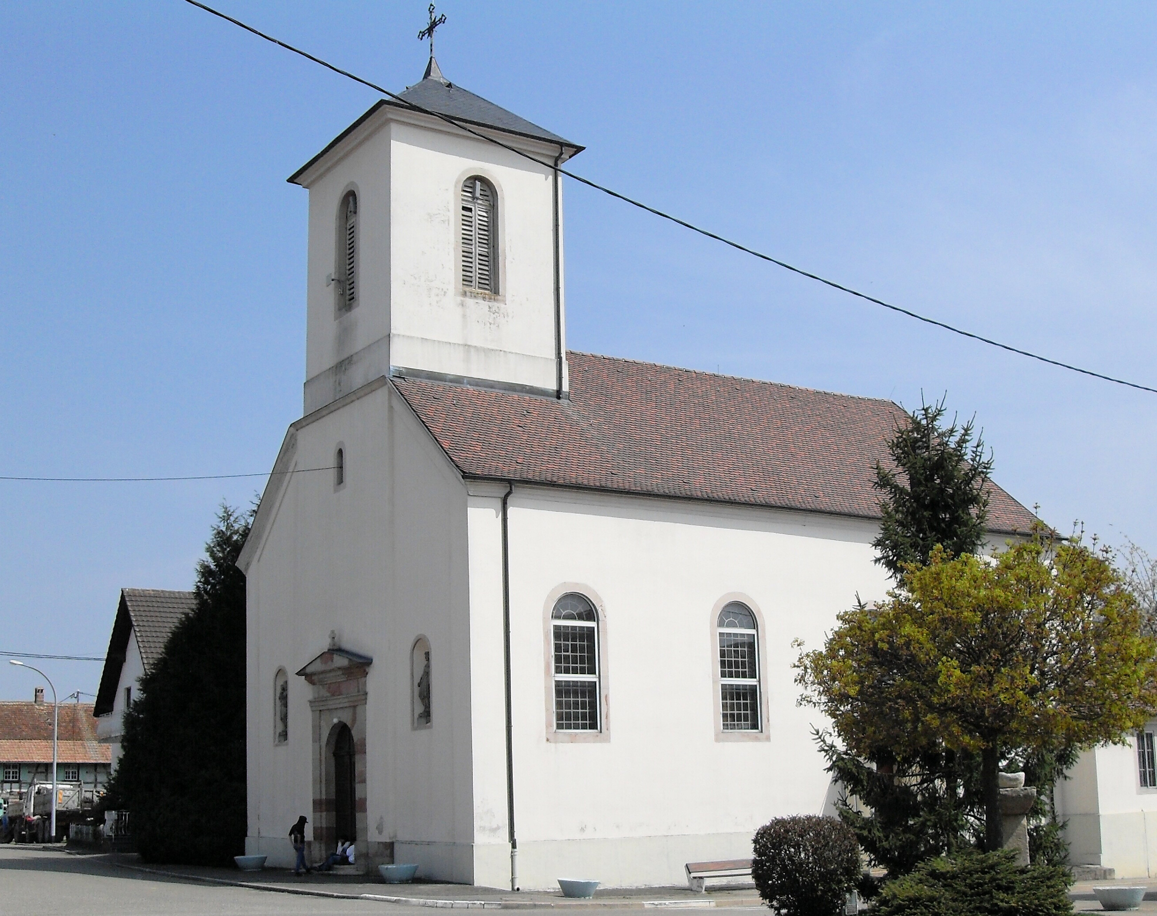 L'église Saint-Laurent à Magstatt-le-Haut